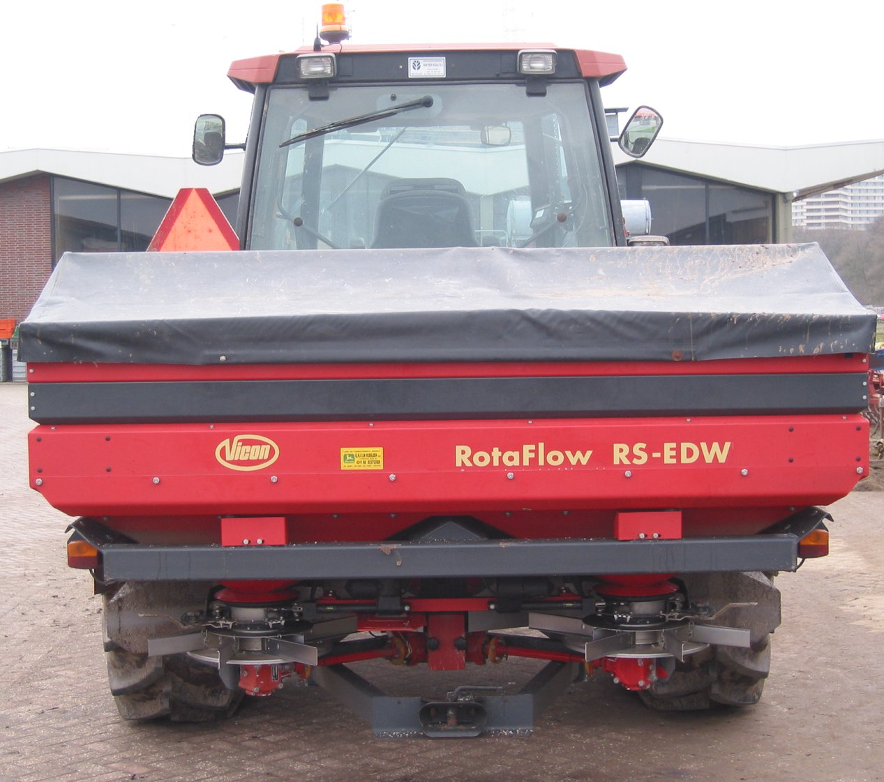 Kunstmeststrooier Vicon RotaFlow RS-EDW